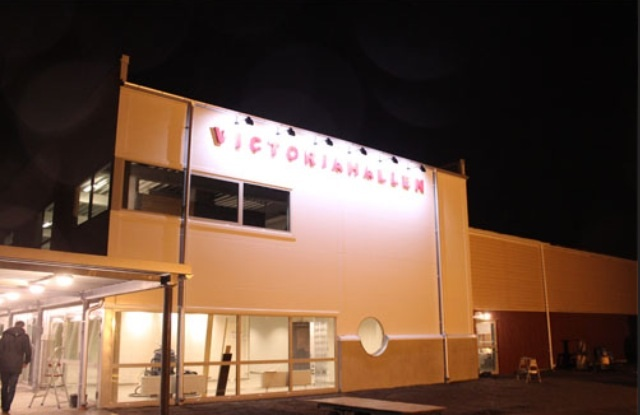 Nya hallen i Nybro står färdig